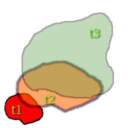 Kombi Diffusion